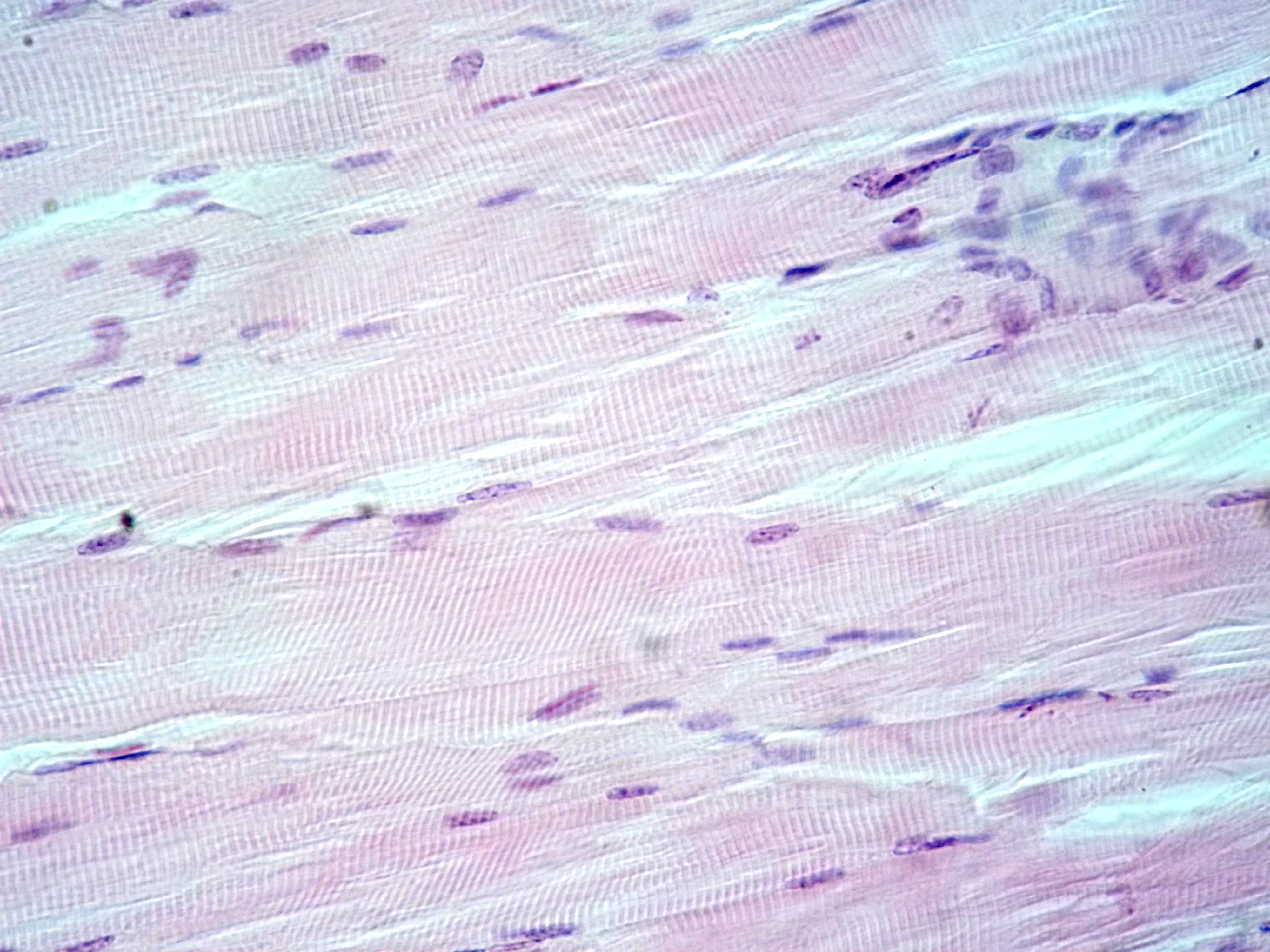 Corte longitudinal de músculo esquelético estriado. Tinción con hematoxilina eosina, 400X. Se aprecian claramente las estriaciones